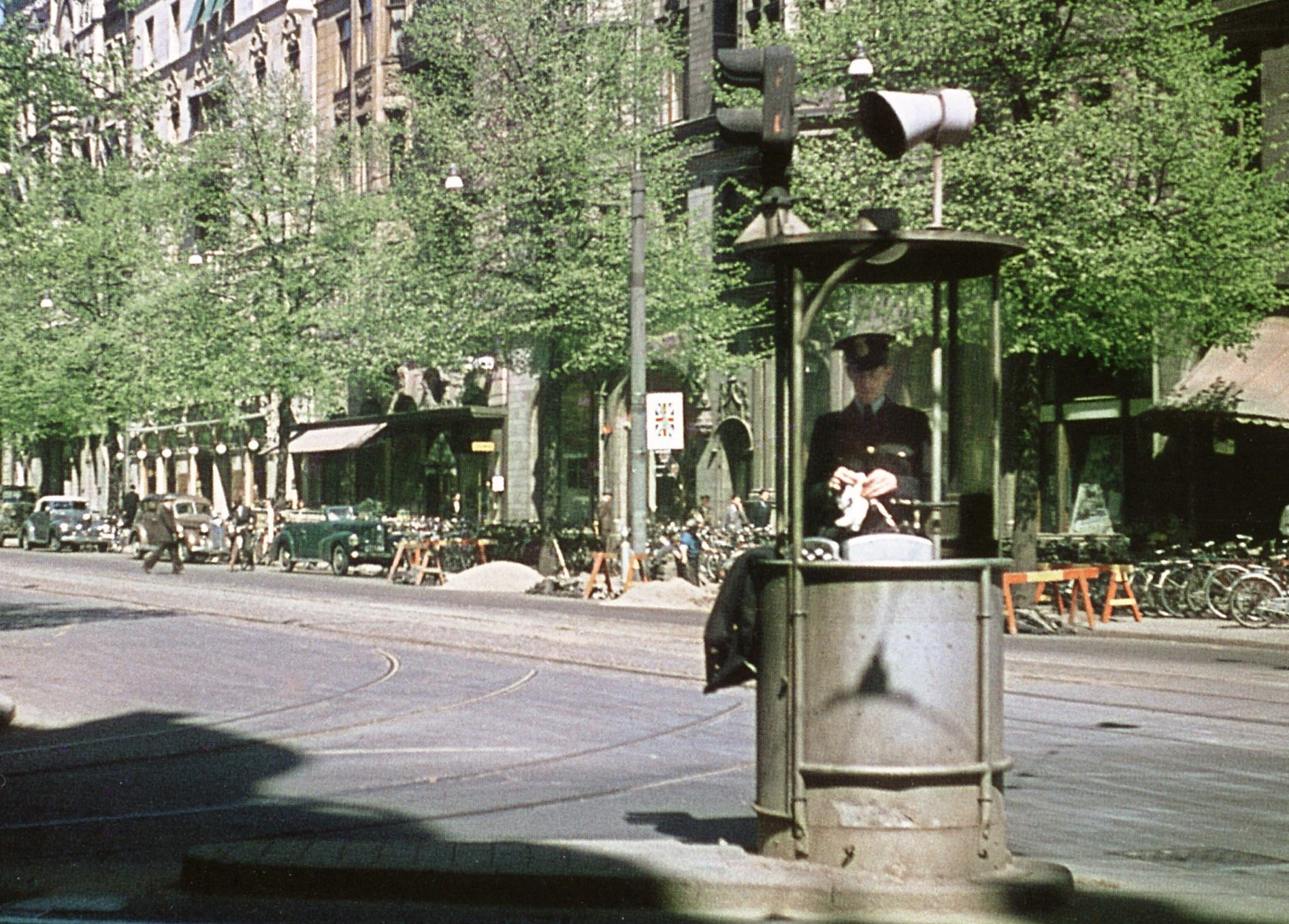 Stureplan trafiksignal 1940-tal